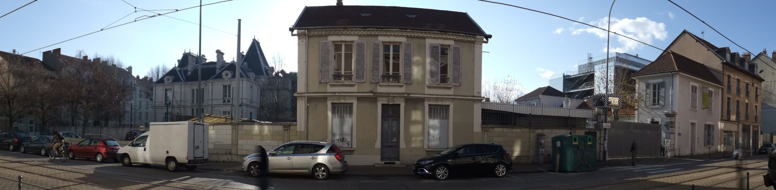 Site historique de l'entreprise familiale ARaymond, 113 cours Berriat à Grenoble, Isère. À gauche le parc et le « château » construit par le fondateur en 1889, à droite le bâtiment du musée Arhome, musée privé ouvert en 2005.